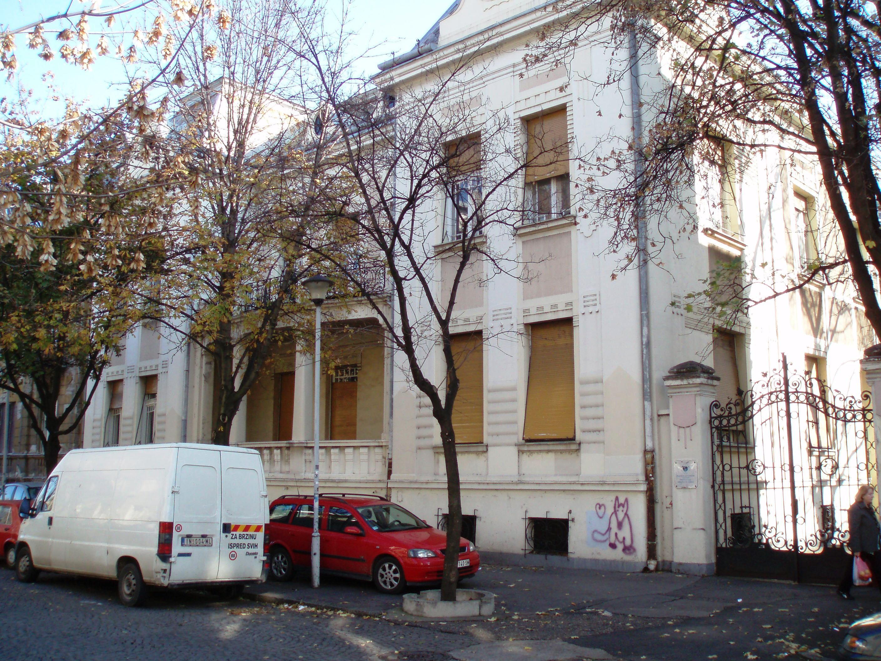 Kuća Mavre Bindera u Zemunu, ul. Dr. Petra Markovića (ranije Sonje Marinkovic) br.4, autor fotografije: Nicolo